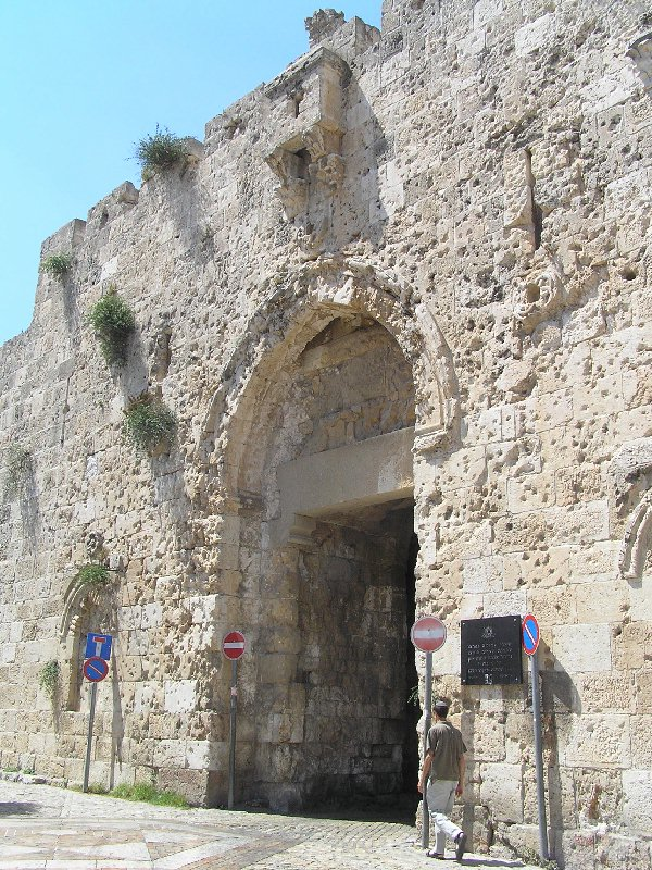 Zion Gate in Jerusalem